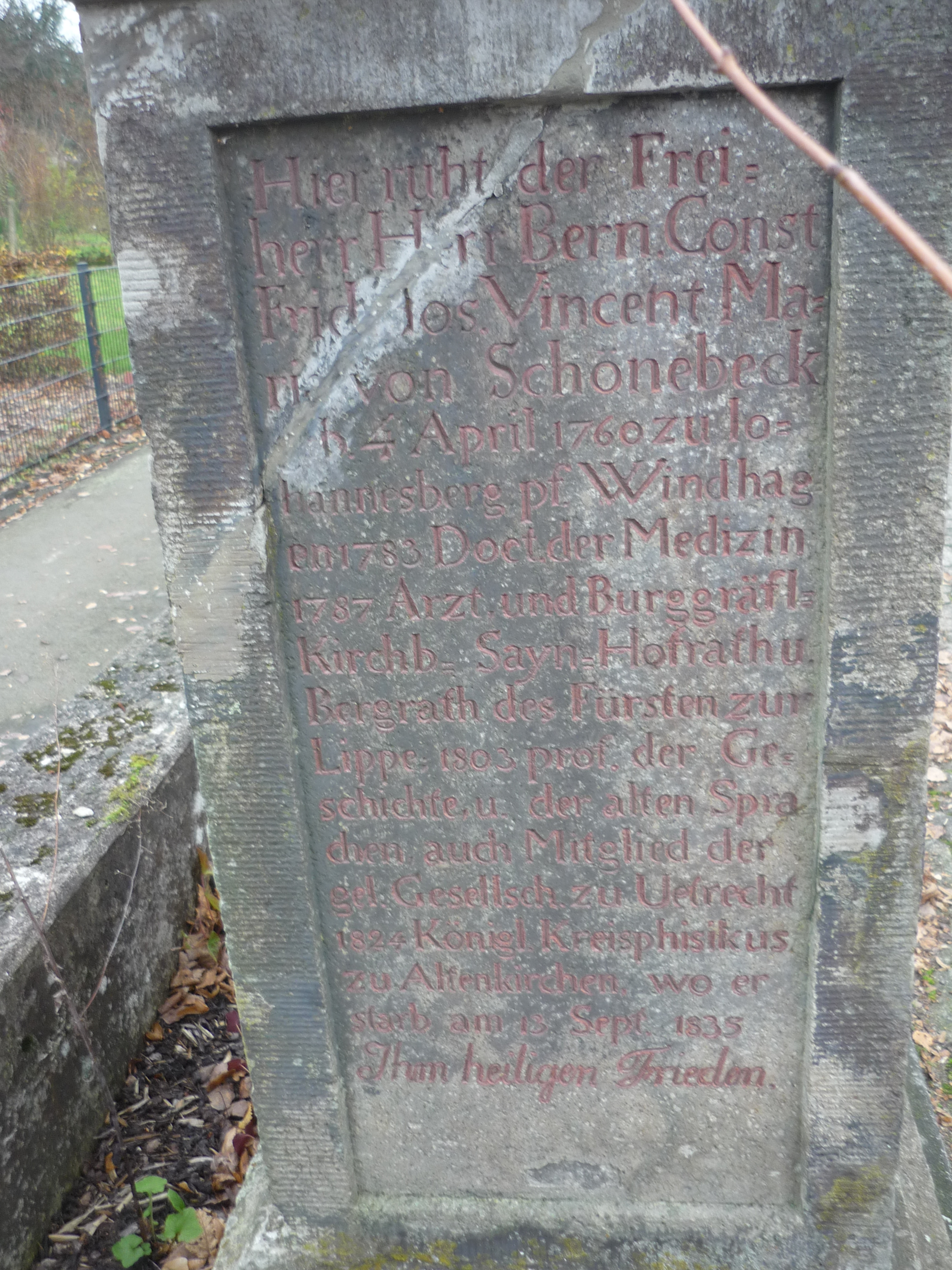 Bernhard v Schönebeck, ehemaliger Grabstein - heute vor dem Gesundheitsamt Altenkirchen (Westerwald)